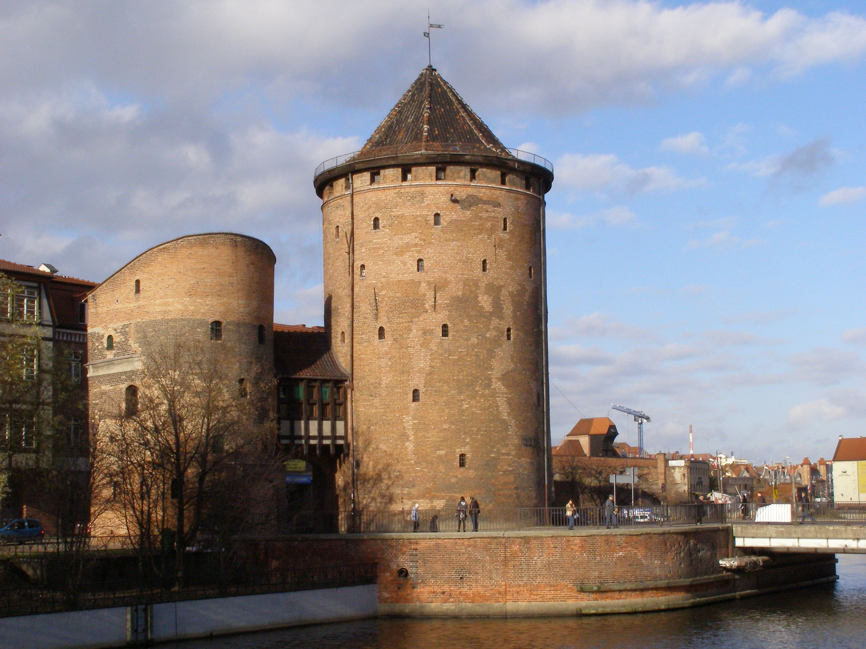 Gdańsk Wyspa Spichrzów, ul. Stągiewna 14 - baszty: Wielka Stągiew, XIV, XV, XVI i Mała Stągiew, XIV, XV, XVI